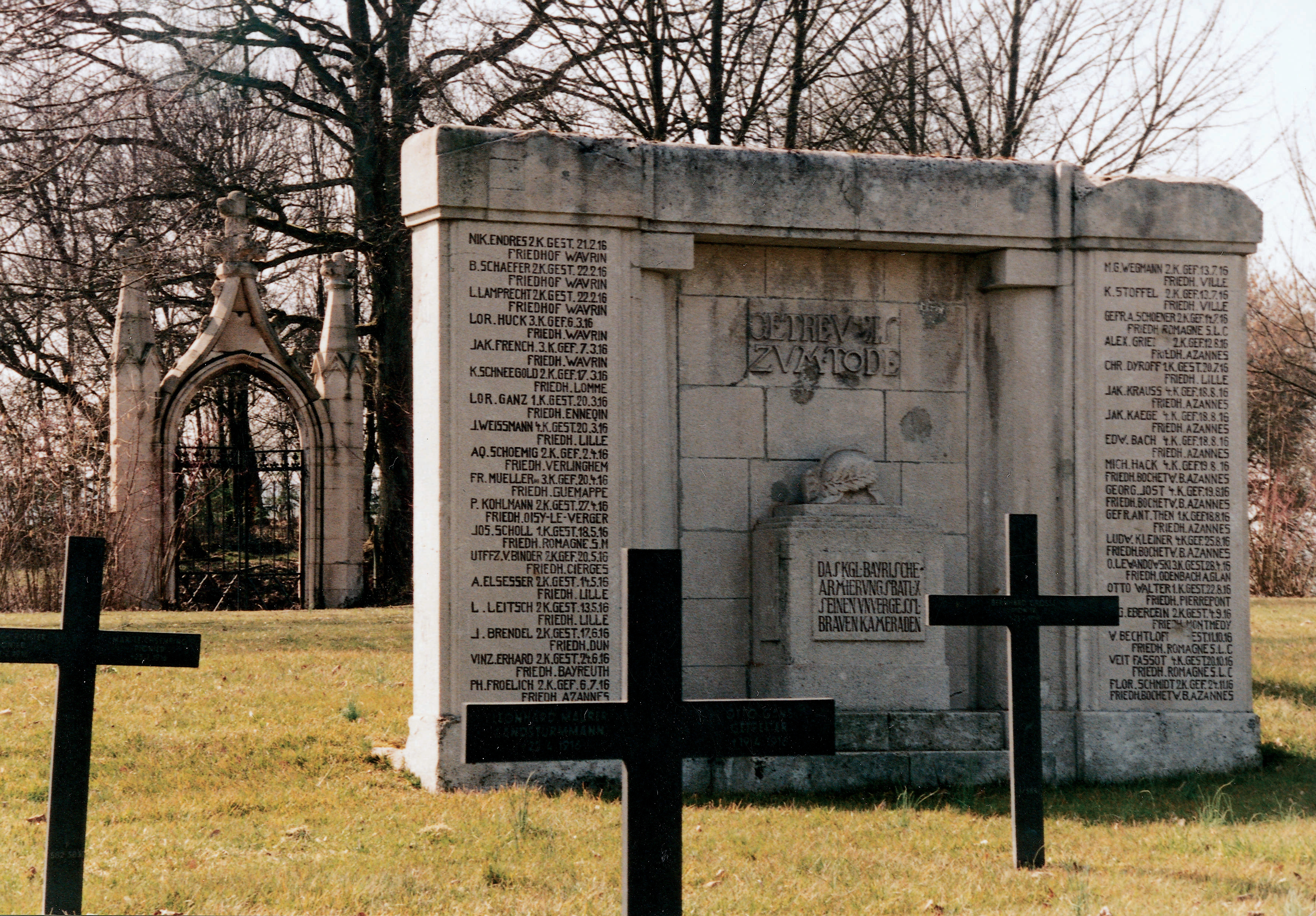 Kriegsgräberstätte Azannes I, Département Meuse, 817 deutsche Kriegstote des Ersten Weltkriegs. Das kgl. bayerische Armierungsbataillon X setzte seinen Gefallenen ein eigenes Denkmal auf dem Friedhof. [1]